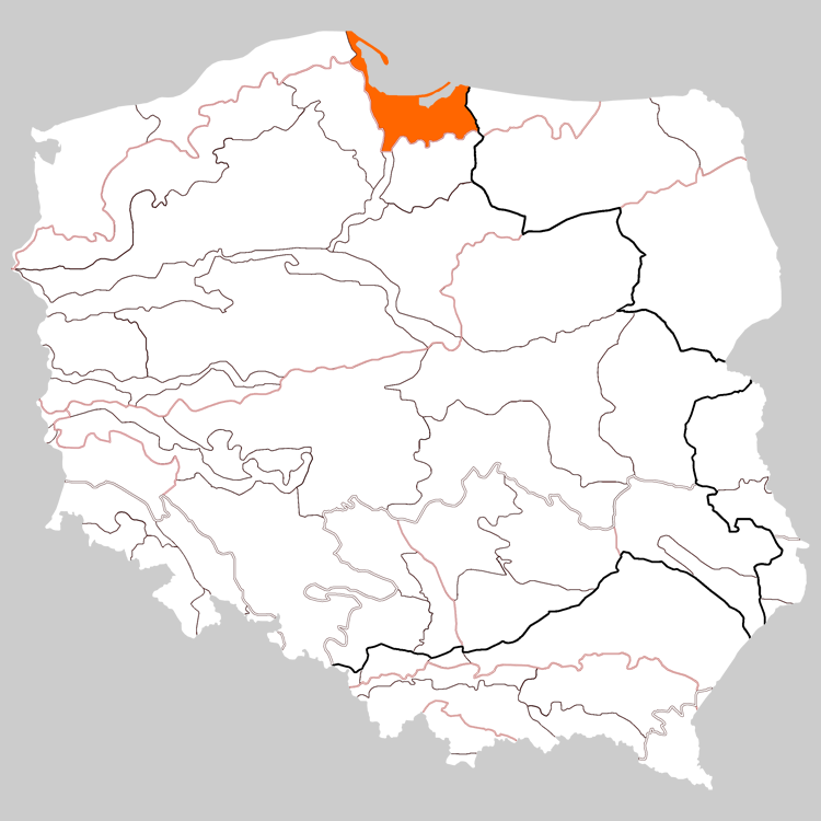 Physico-geographical regionalization of Poland Macroregion 313.5 Littoral Gdańsk Region Regionalizacja fizycznogeograficzna Polski Makroregion 313.5 Pobrzeże Gdańskie